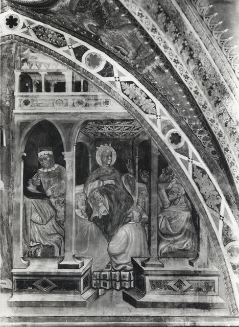 Maestro della Sagra di Carpi Disputa di santa Caterina d'Alessandria con i filosofi Affresco Chiesa di Santa Maria in Castello (Sagra) - Carpi Cappella di Santa Caterina